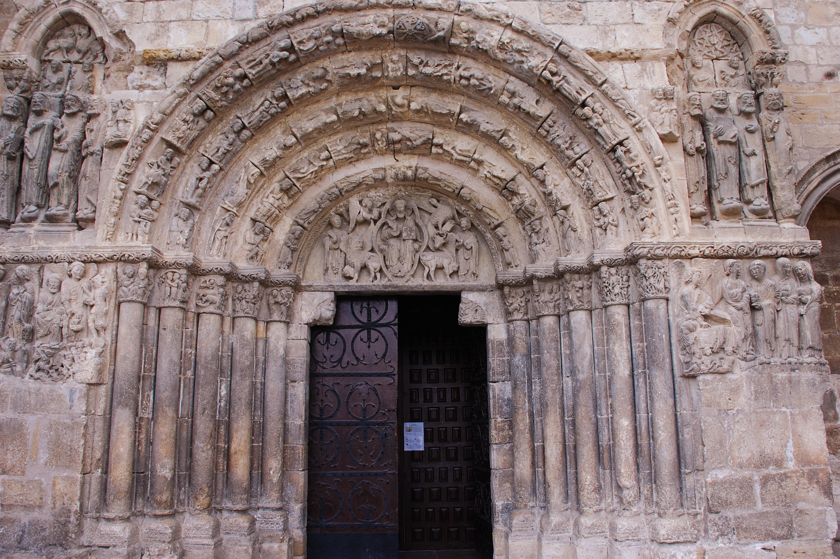 Pórtico de la iglesia de San Miguel en Estella (Navarra, España)